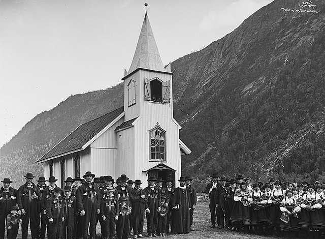 Austad kyrkje i Bygland